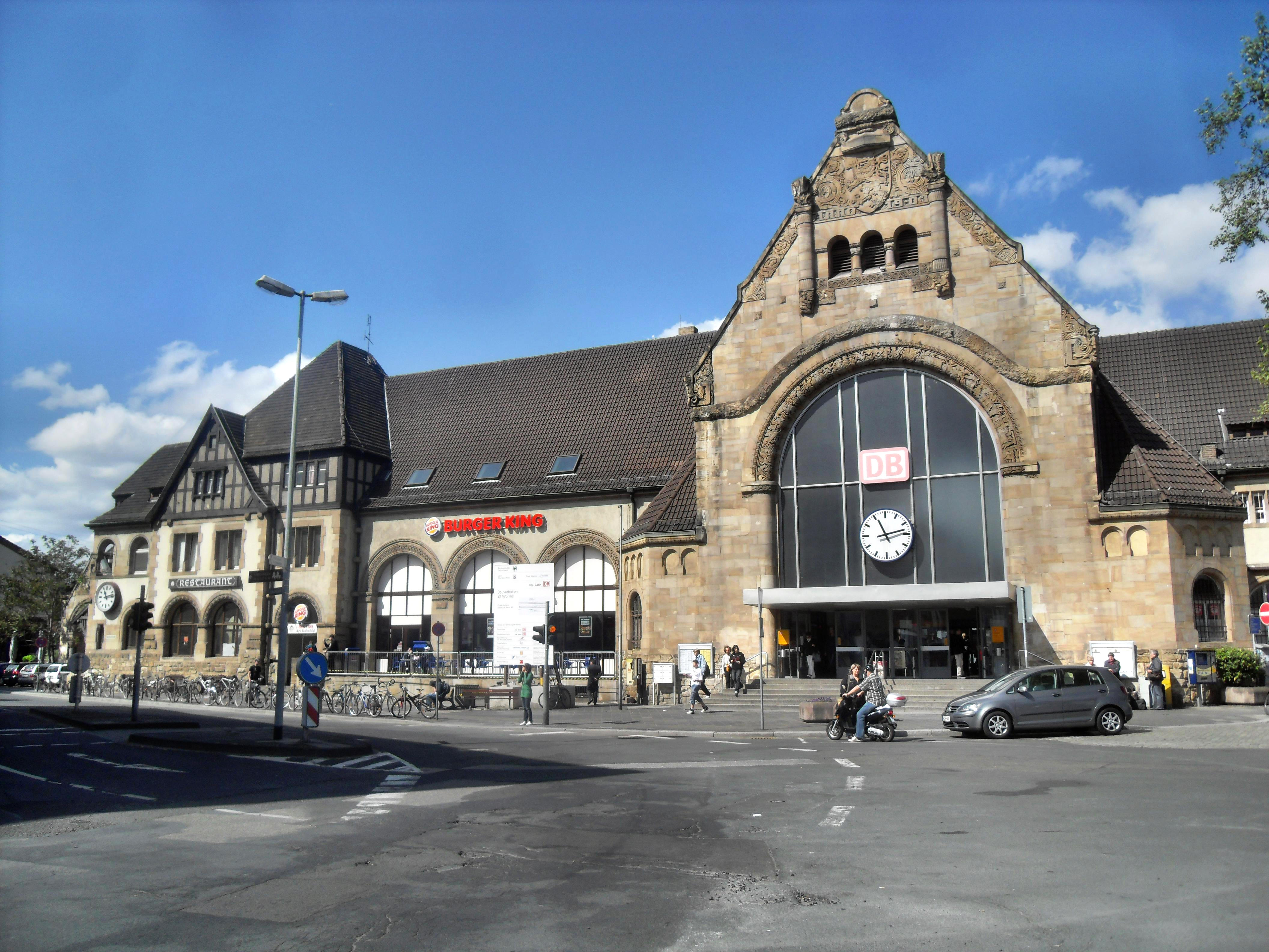 Der Wormser Hauptbahnhof von östlicher Seite aus